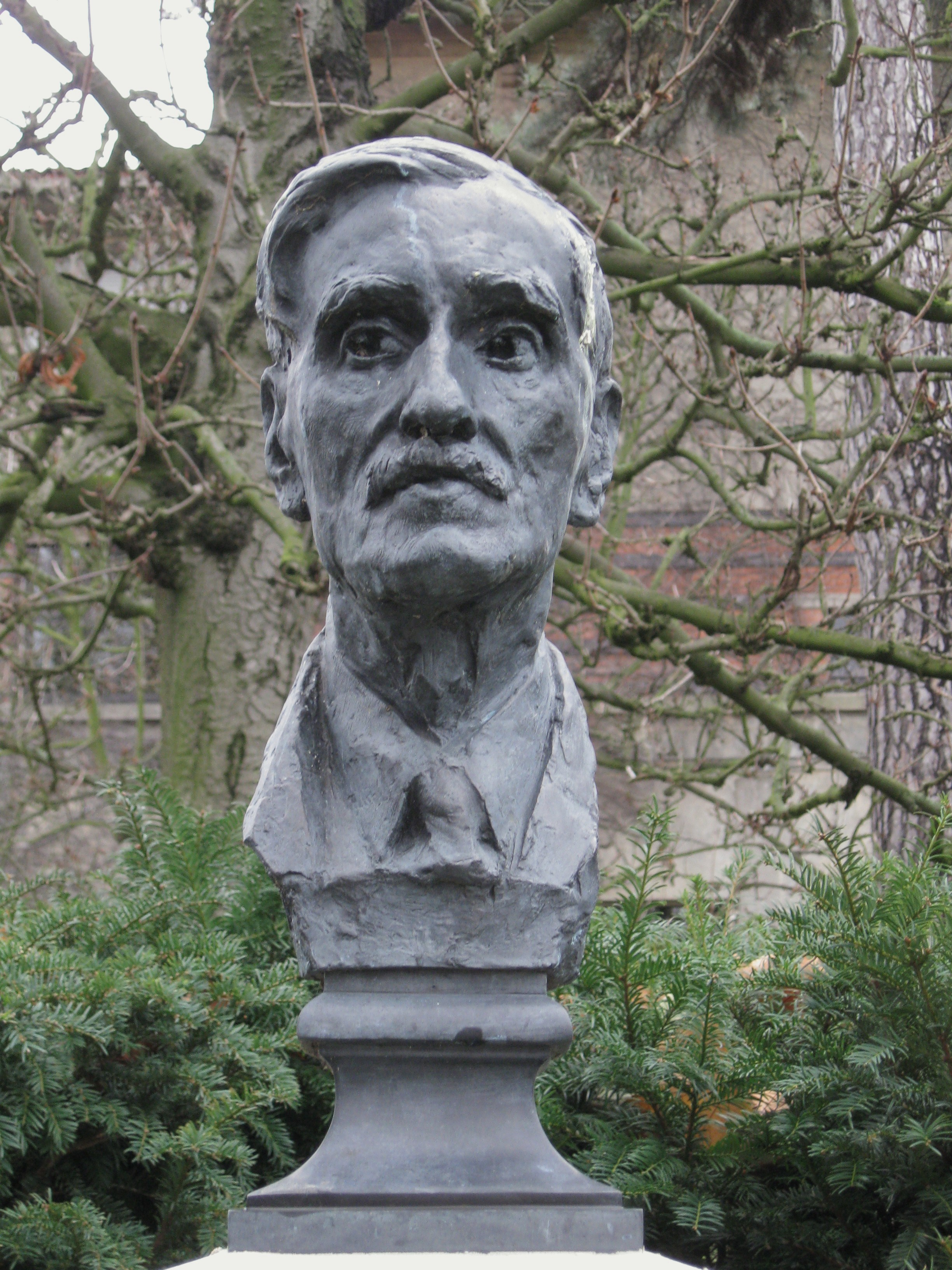 Buste de Jean Charles-Brun (1870-1946) dans le Jardin des Félibres, Sceaux, Hauts-de-Seine, France